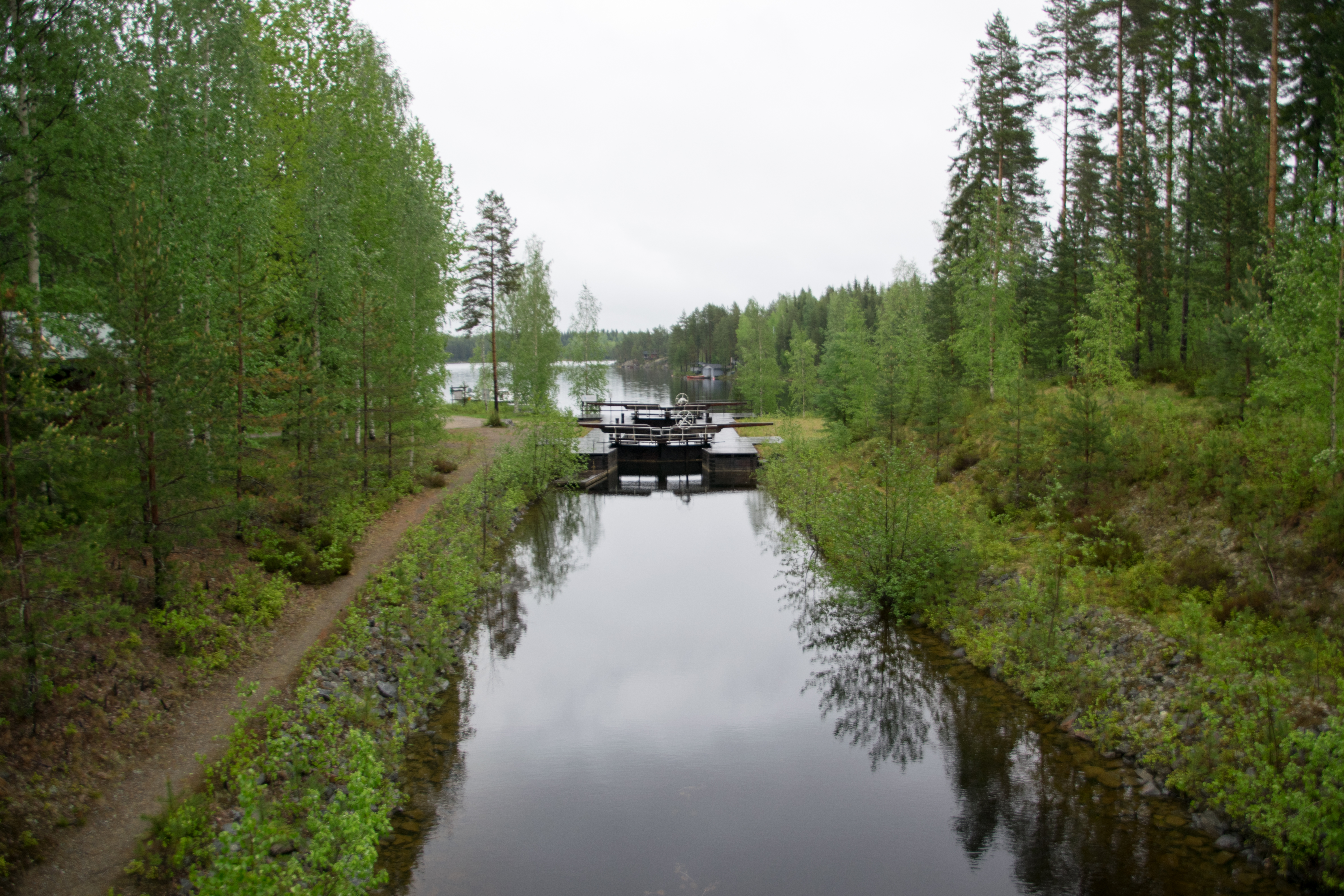 Kuivataipaleen kanava